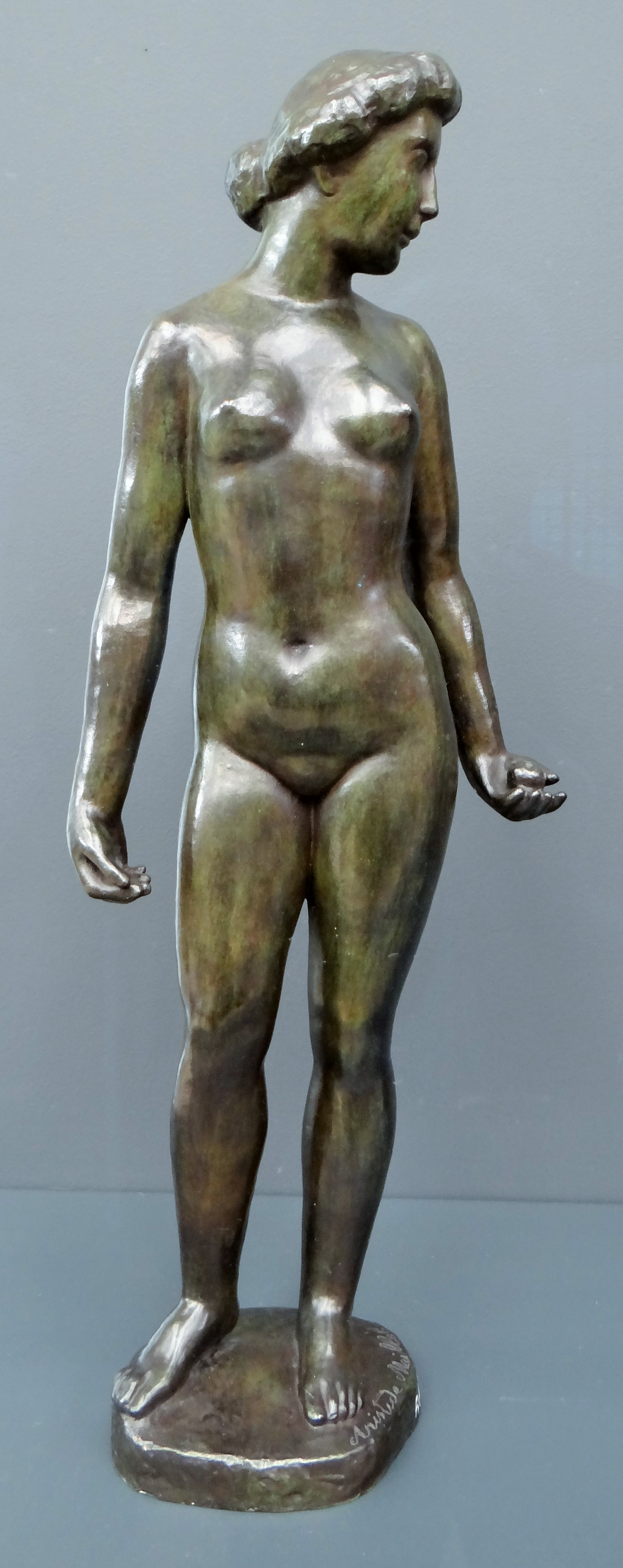 Eve à la pomme, 1899, statue en bronze, fonte Bingen et Costenoble, Aristide Maillol